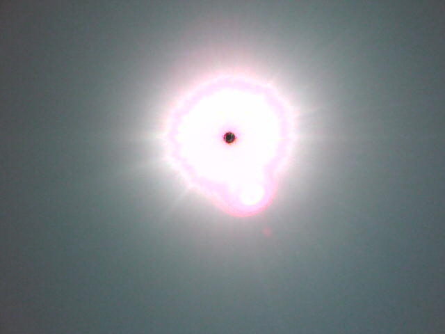 O Sol.